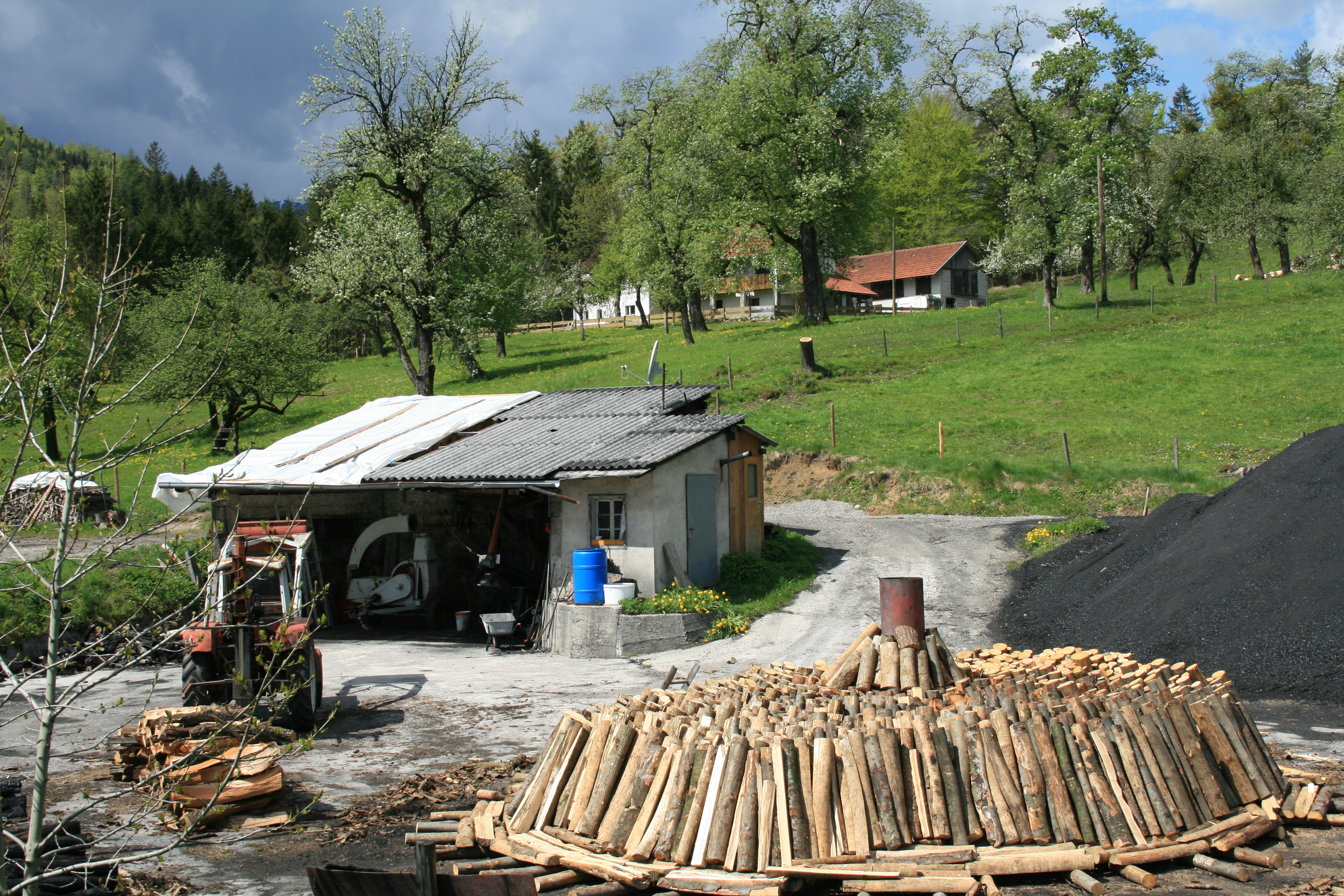 Köhlerei in Grünburg am Steyrtalradweg bei Steyrdurchbruch